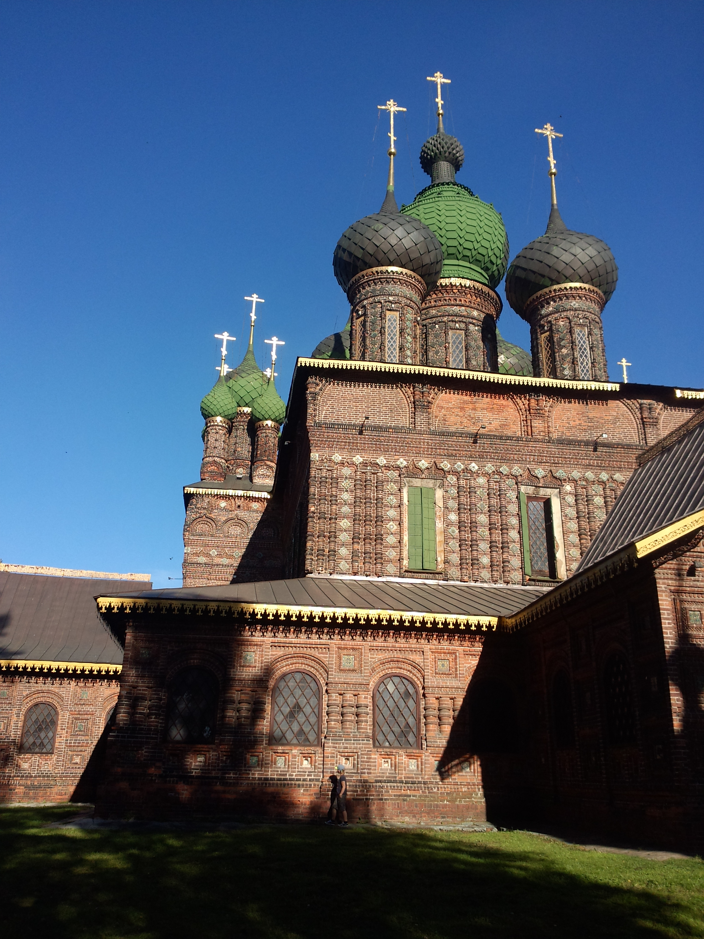 Церковь Иоанна Предтечи в Толчковенабережная 2-я Закоторосльная, 69, Ярославль, Ярославская область